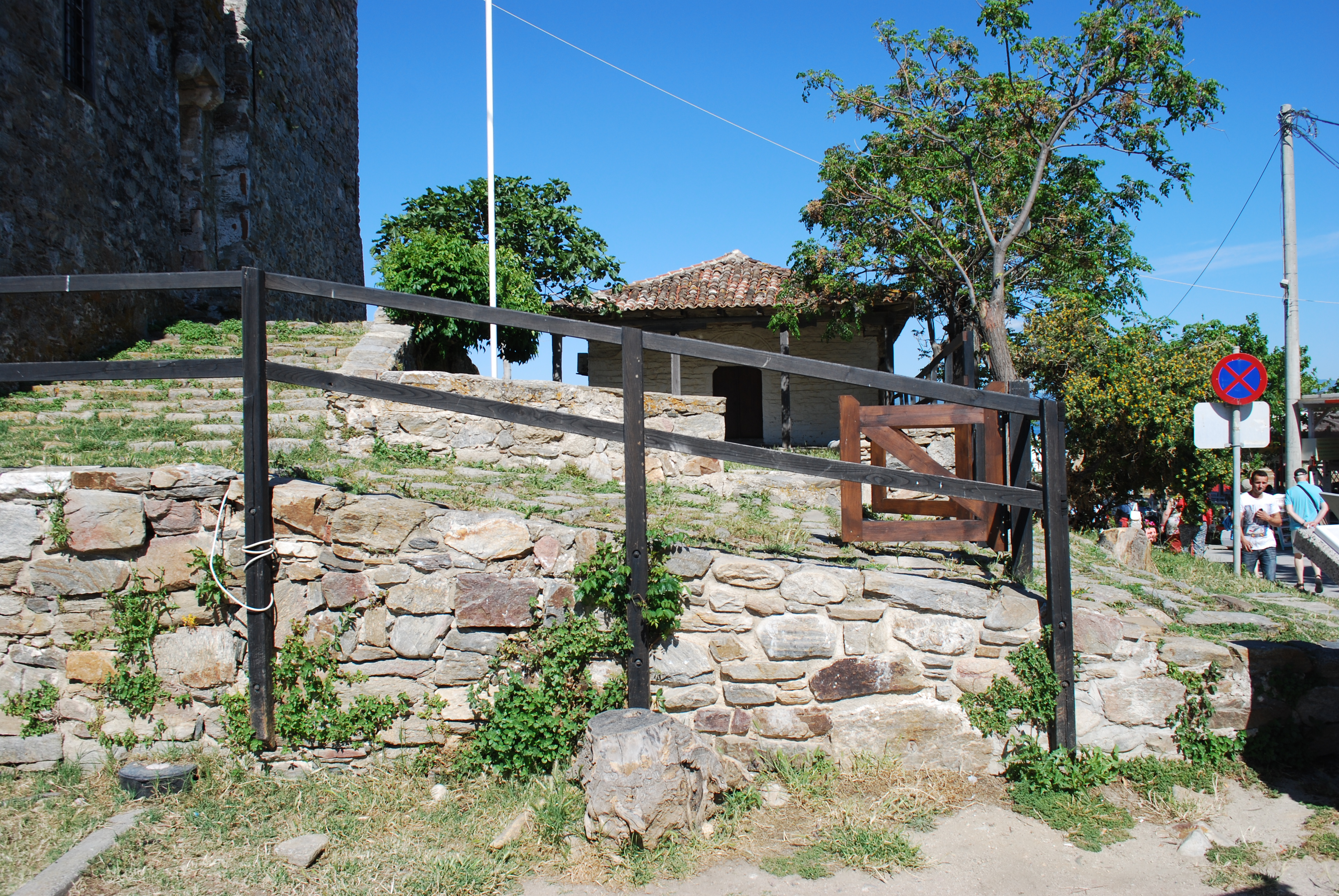 Vue du petit port d'Ouranopolis, point de départ des croisières touristiques le long des côtes du Mont Athos.